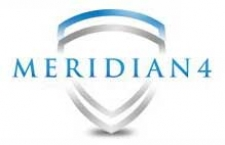 Meridian4.Название на фоне щита.